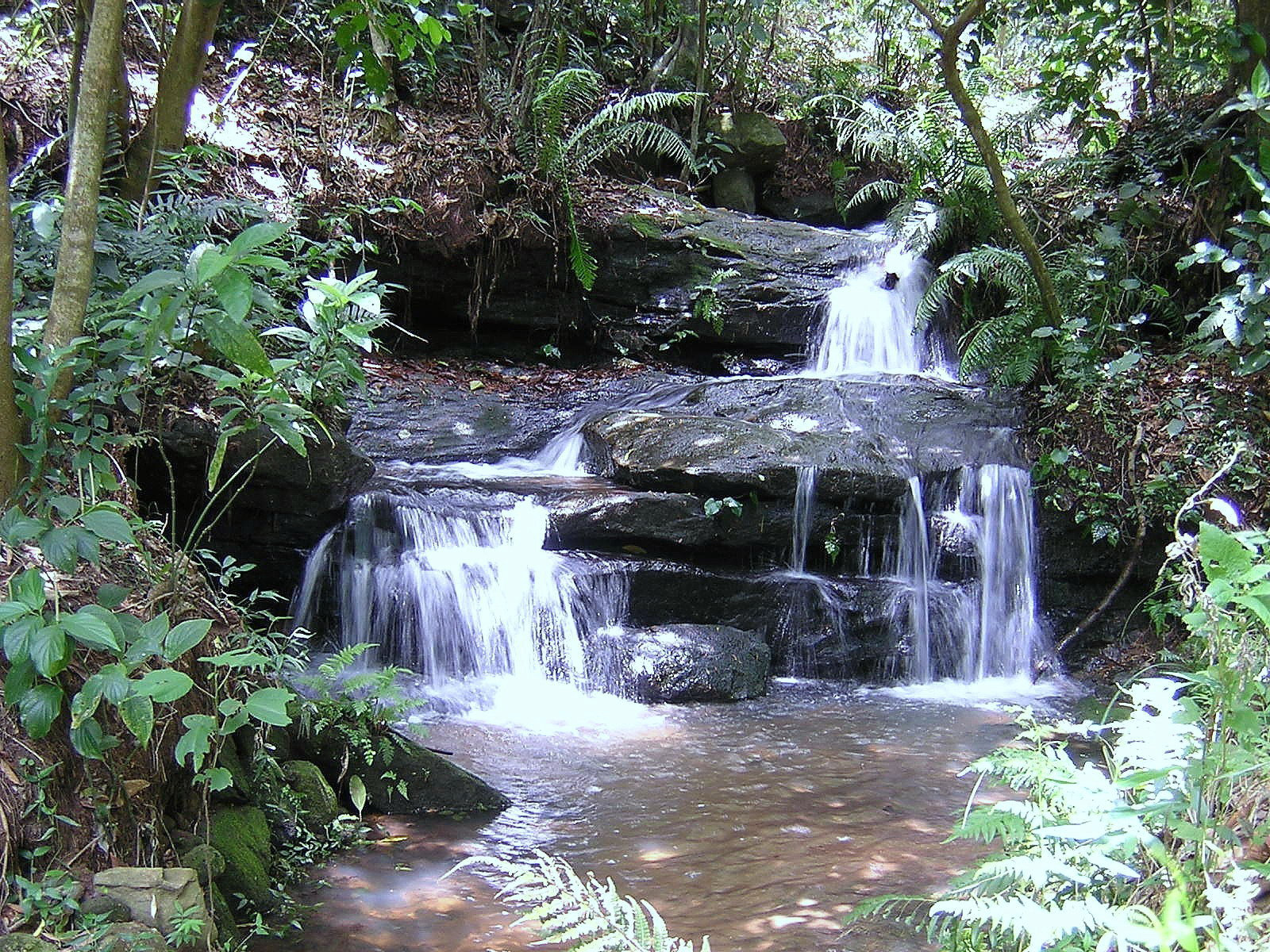 Cascada Pikysyry